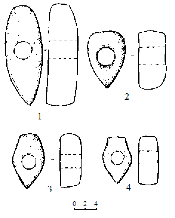 Каменные сверленые топоры-молотки из окрестностей с.Чермные